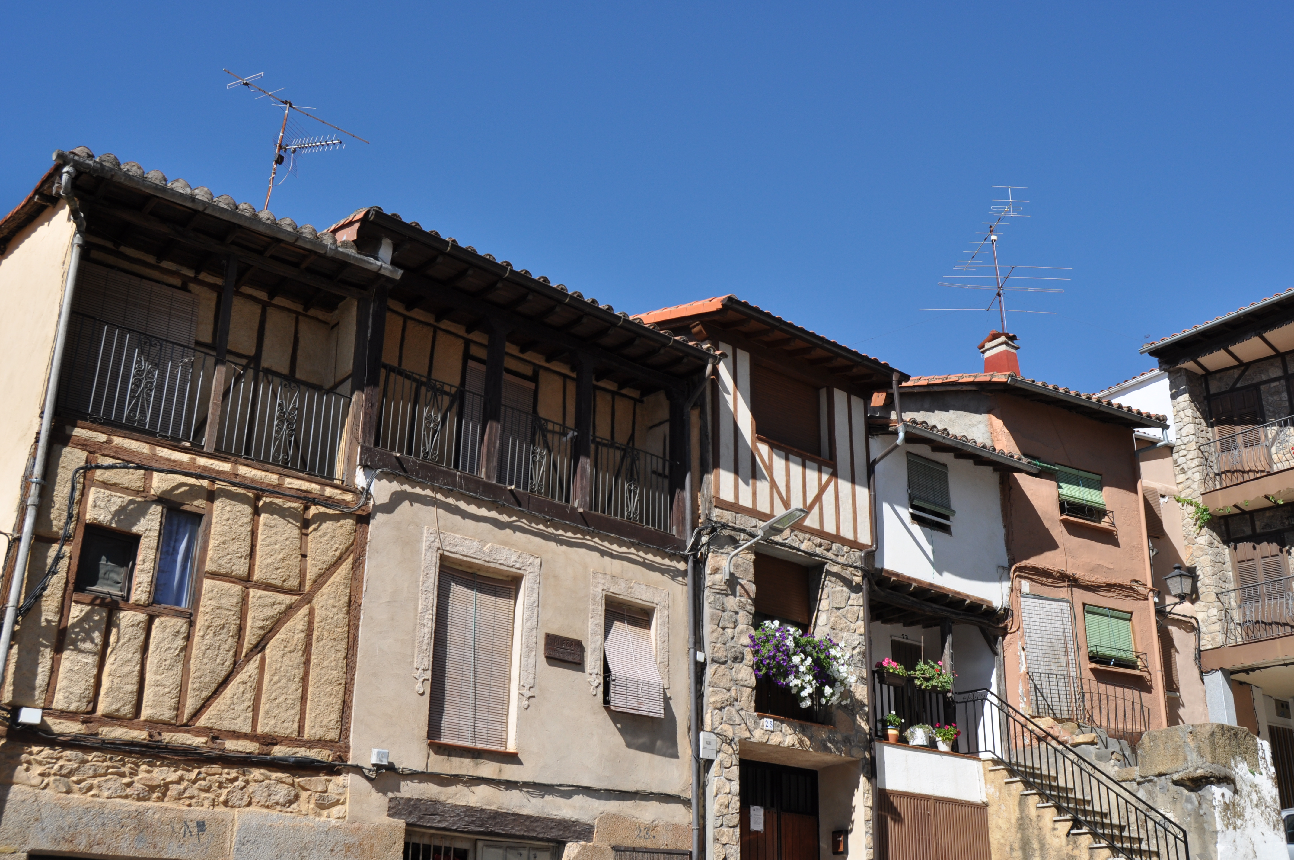 Villanueva del Conde - 022